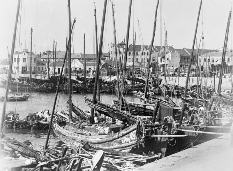 Tsingtau, Dschunken im Hafen China, Tsingtau Dschunken-Hafen [Fischereihafen]